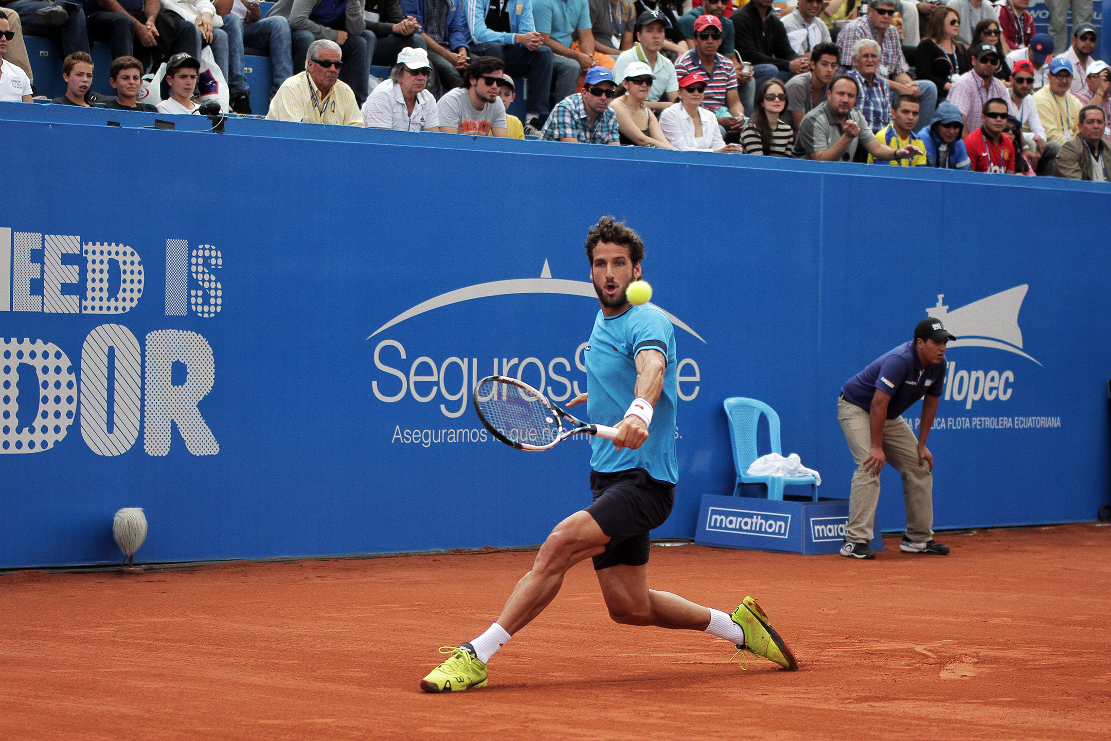 Quito, 08 feb (ANDES).- Final ATP 250 Ecuador Open Quito donde compitieron por el campeonato los tenistas Victor Estrella y Feliciano López. Fotografías: Carlos Rodríguez/ANDES.